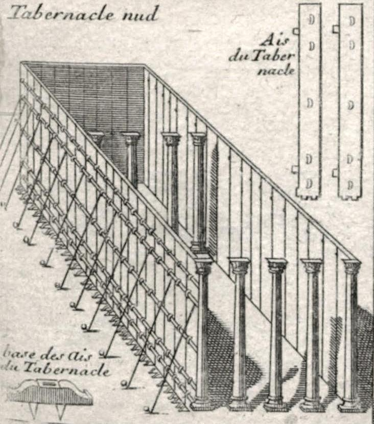 Tabernaclè nud. From: Carte du voïage des Israëlites dans le désert depuis leur sortie de l'Egipte jusqu'au passage du Jourdain, dressé par l'auteur du commentaire de l'Exode et / exécutée par Liébaux, géografe.